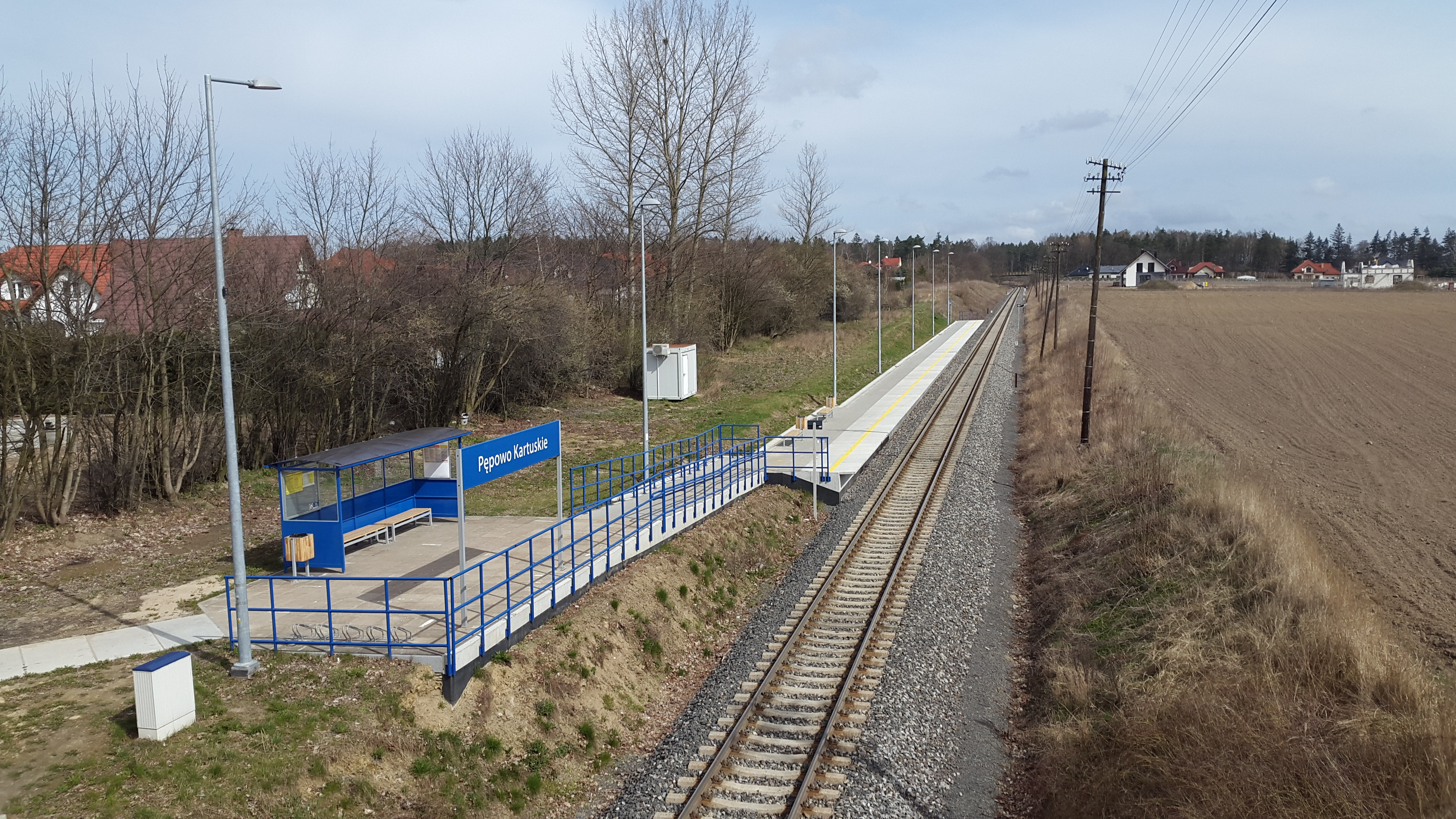 Pępowo Kartuskie, przystanek kolejowy po remoncie.